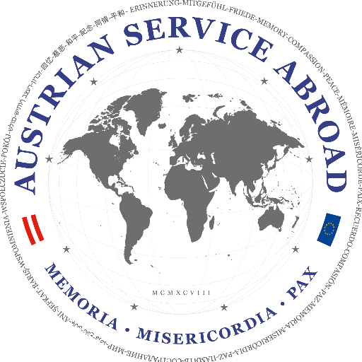 Emblem Österreichischer Auslandsdienst